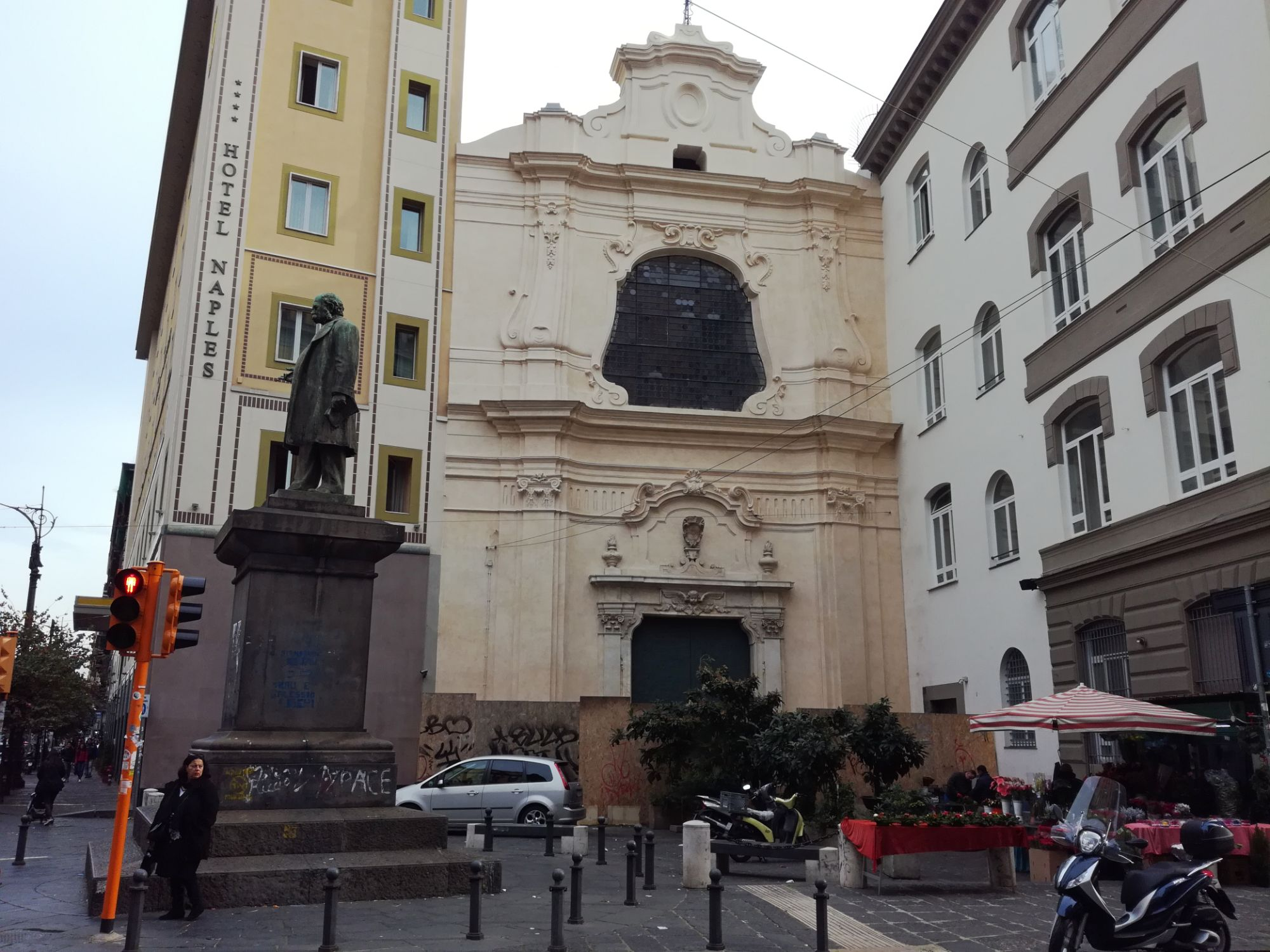 Esterno, San Pietro Martire, Napoli